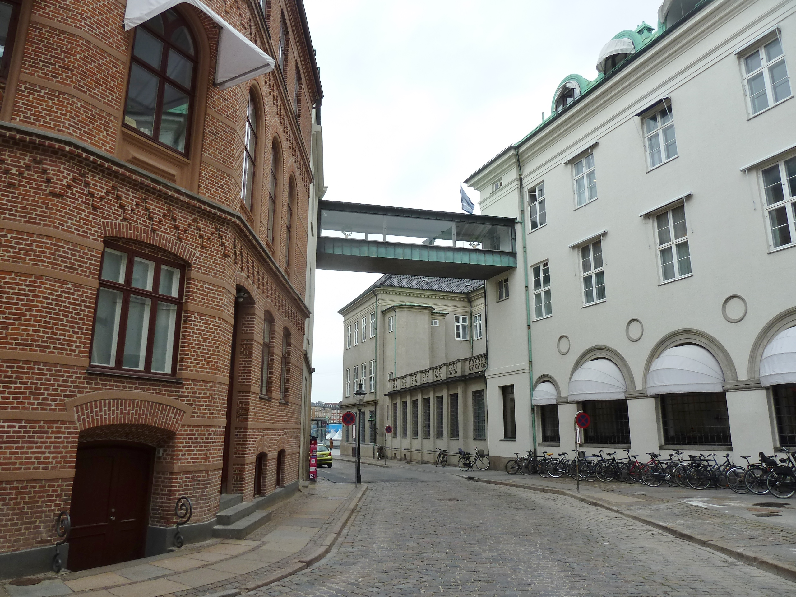 The street Laksegade in Indre By in Copenhagen.